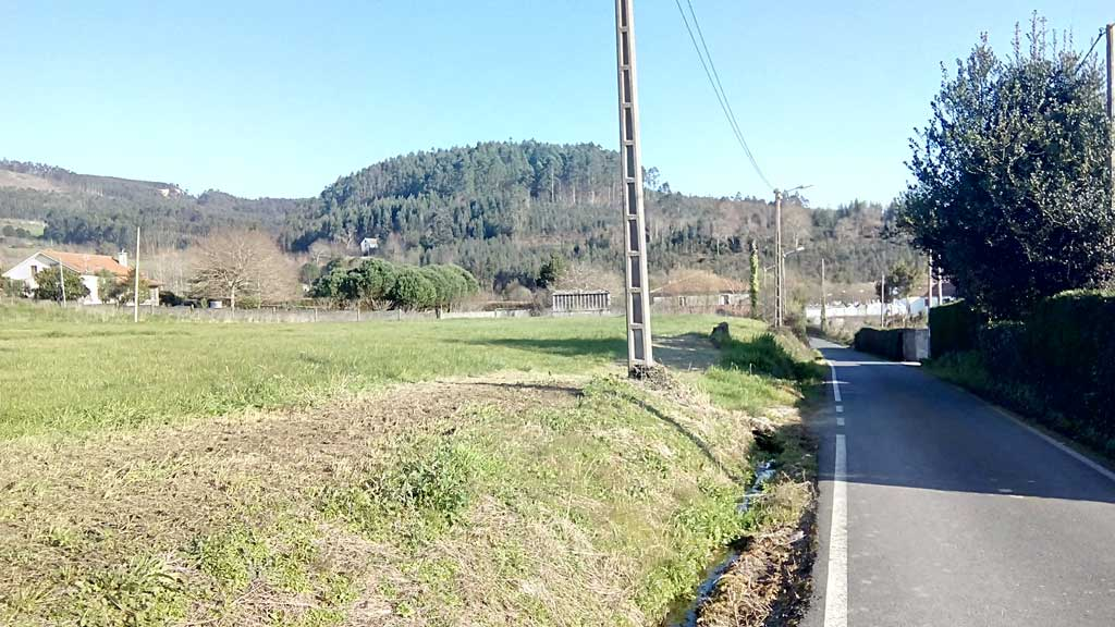 Vista do Camiño Novo, Sedes.